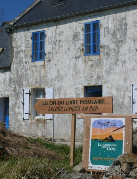 Le Salon du livre insulaire se tient tous les ans sur l'île d'Ouessant